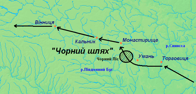 Чорний шлях: Маршрут Чорного шляху